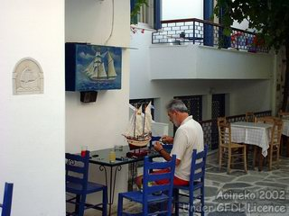 Tinos